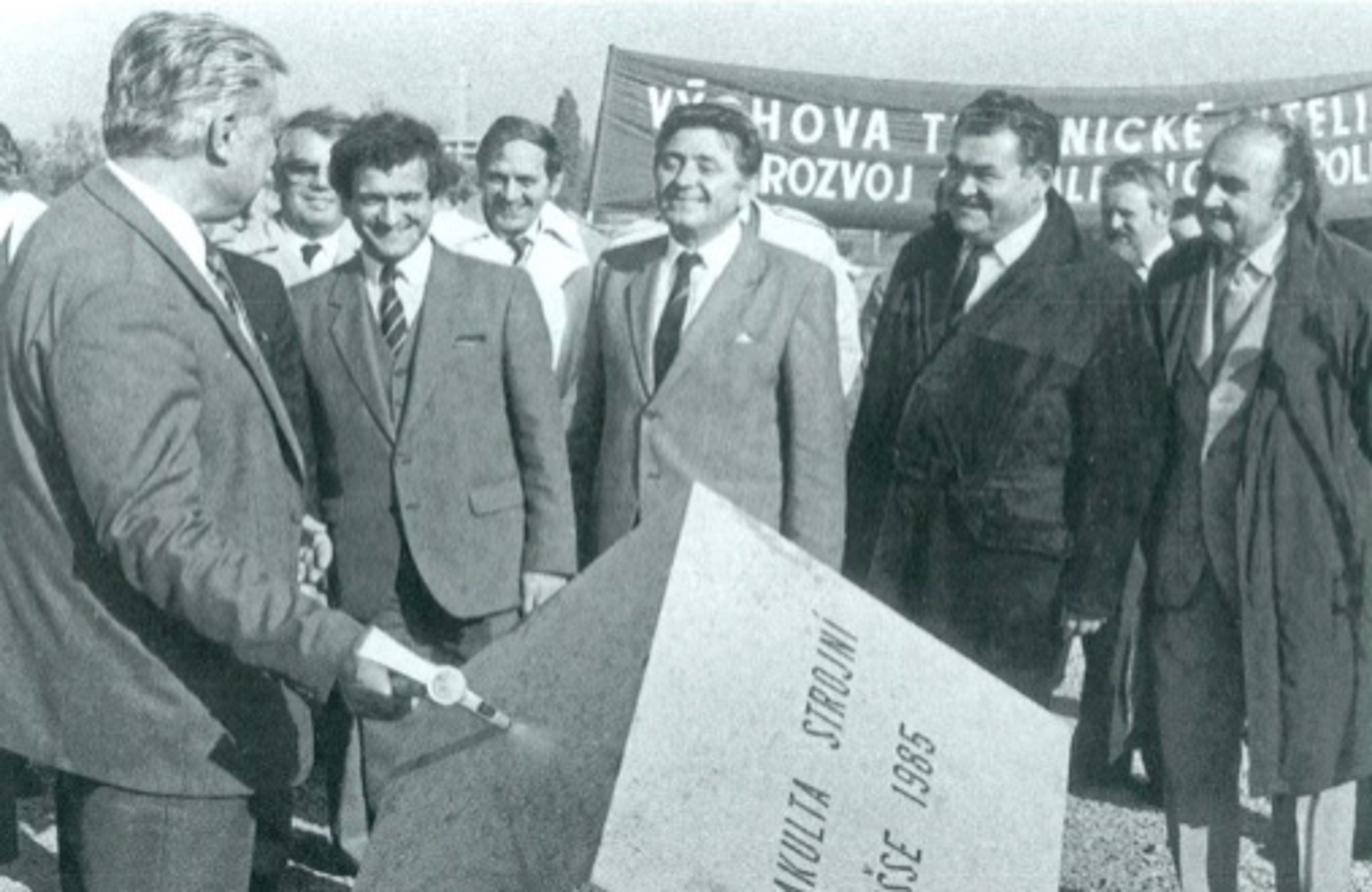 Položení základního kamene budovy Fakulty strojní v Plzni roku 1985